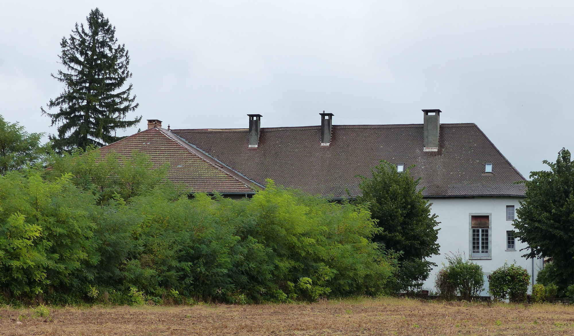 Vue d'ensemble du logis, vestige de l'abbaye des Ayes à Crolles (38)